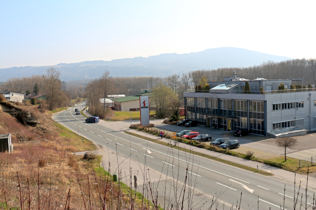 Die B 156a (Abzweigung der Lamprechtshausener Straße B 156) im Bereich der Stadtgemeinde Oberndorf bei Salzburg. Im Hintergrund der Haunsberg von Norden.